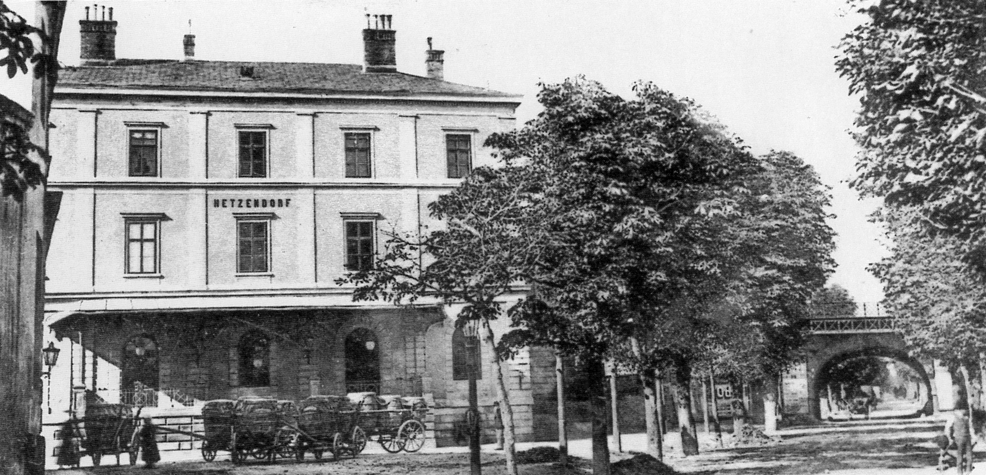 Bahnhof Hetzendorf, Südbahn, Wien, mit Eisenbahnbrücke über die Altmannsdorfer Straße. 1897